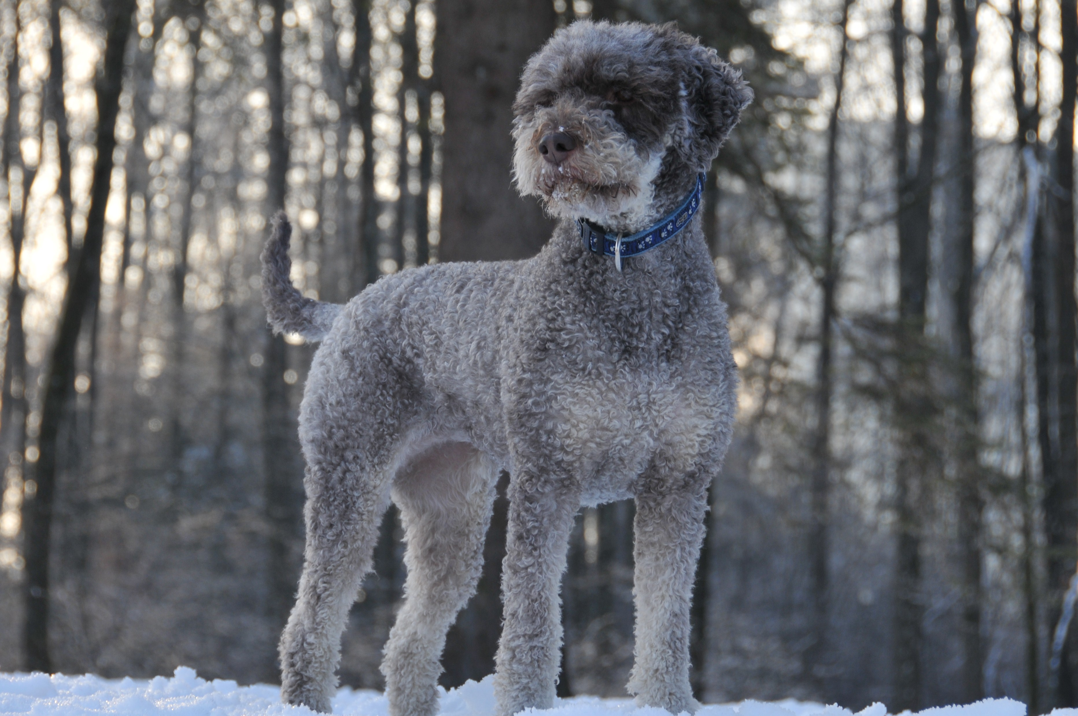 Lagotto im Winter